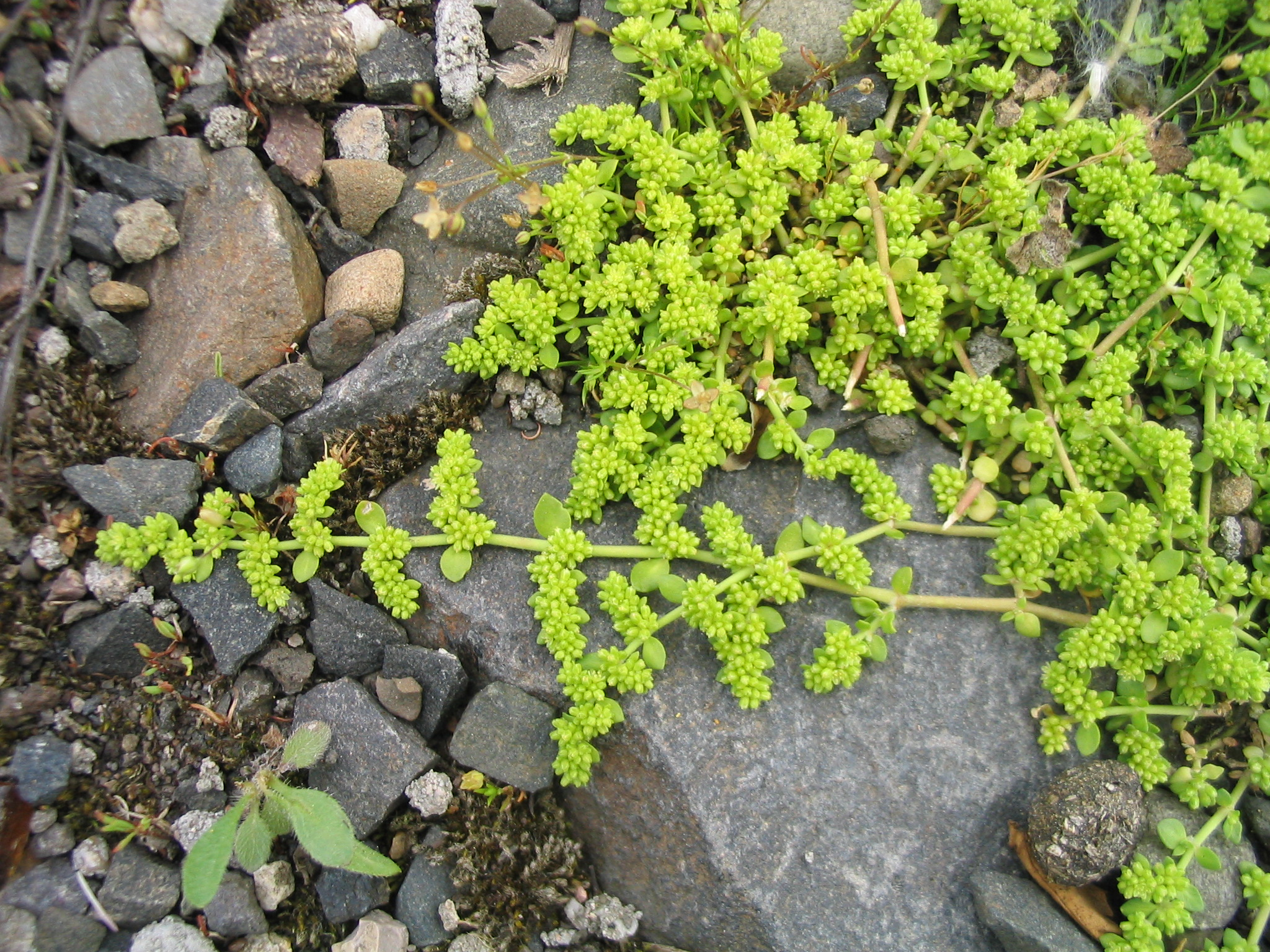 Kahles Bruchkraut (Herniaria glabra), fotografiert am 05.06.2005 in Bingen/Rhein, Ruderalfläche fotografiert von Dr. Hagen Graebner